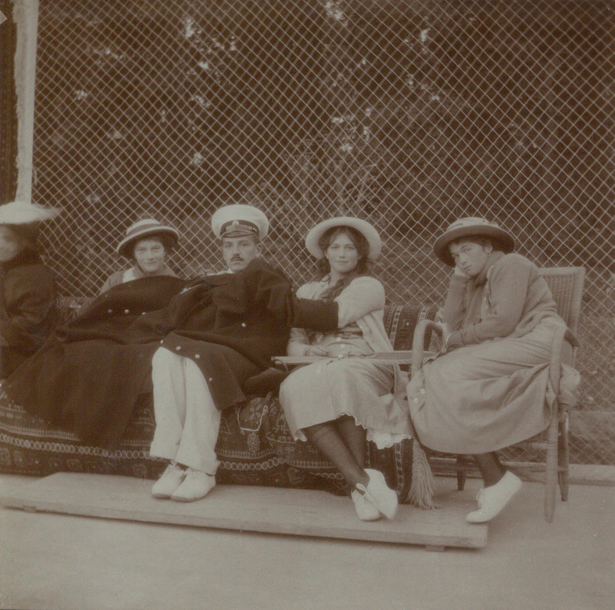 1913年にクリミアにあるテニスコートで。 オリガ皇女、タチアナ皇女、マリア皇女、ロジオノフ中尉。